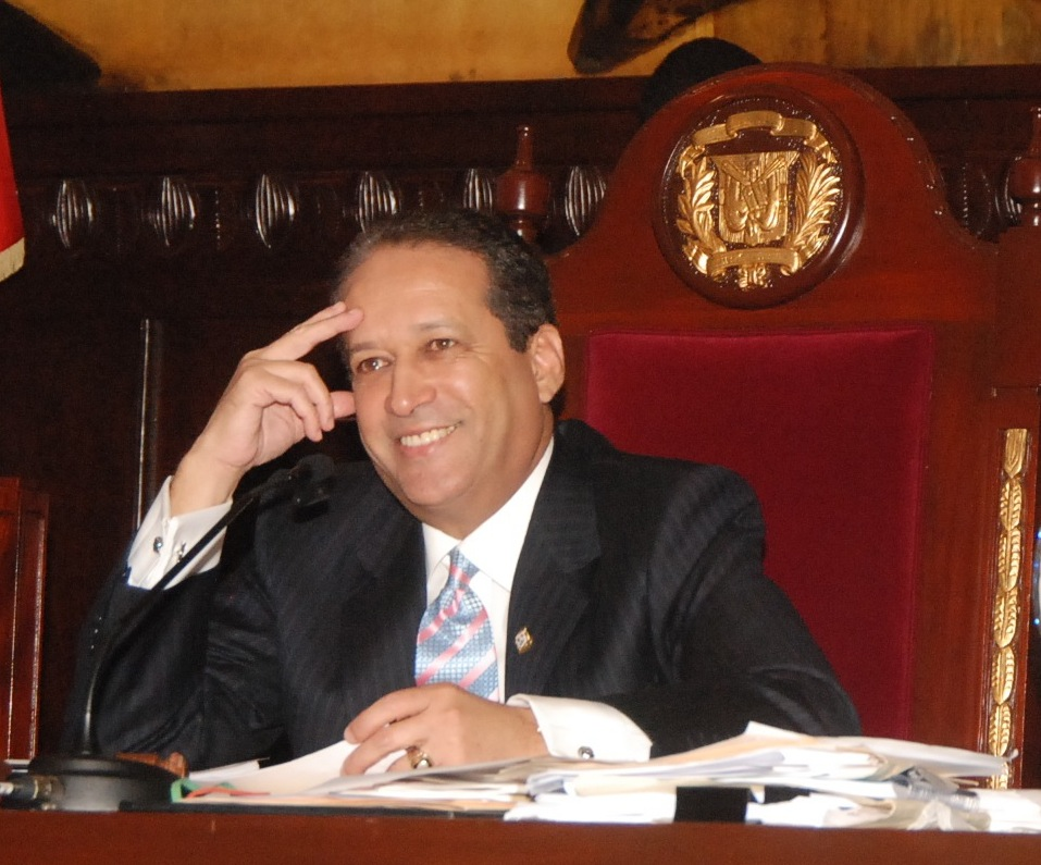 Reinaldo Pared Perez